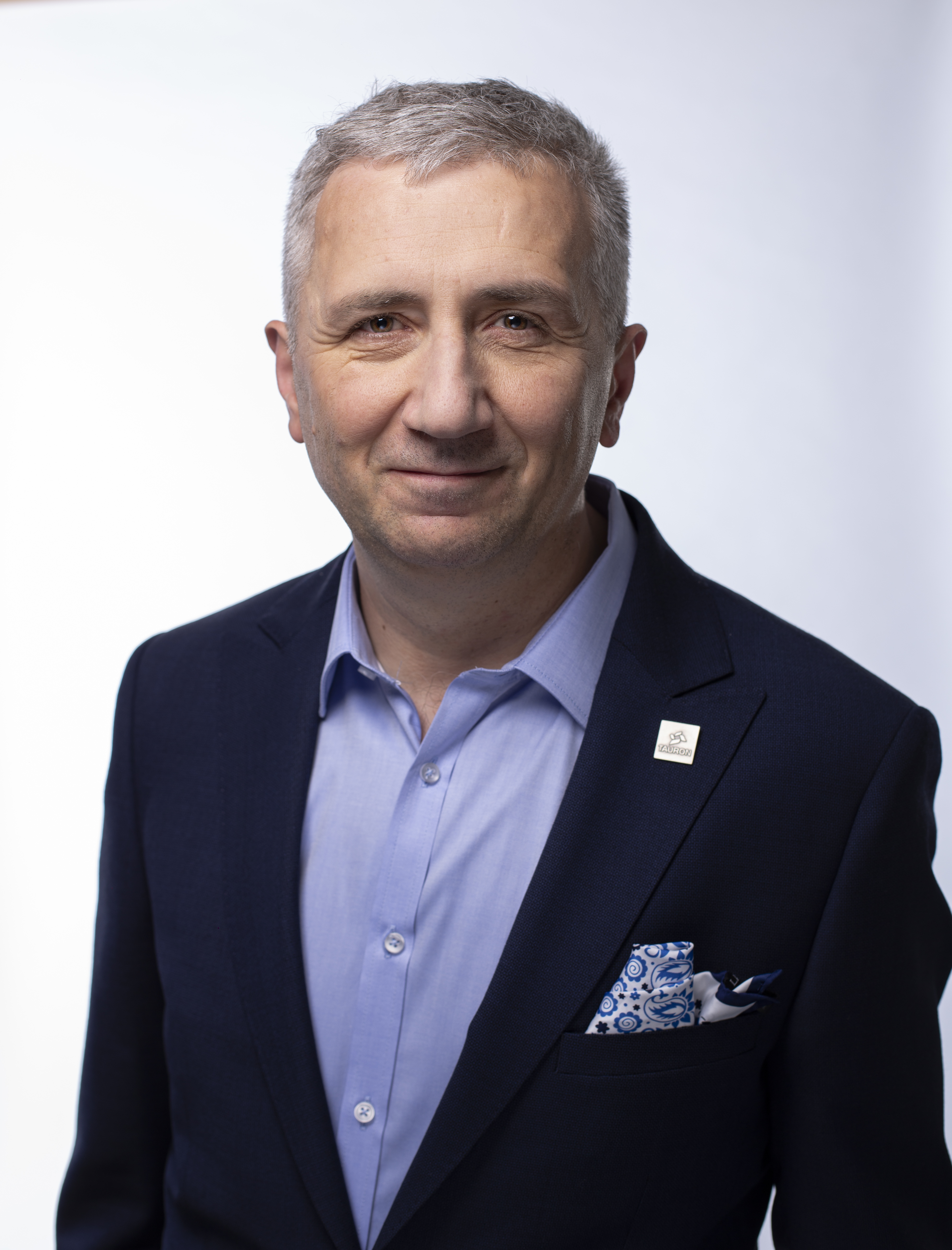 Prezes Zarządu, TAURON Polska Energia